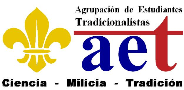 Logotipo de la AET